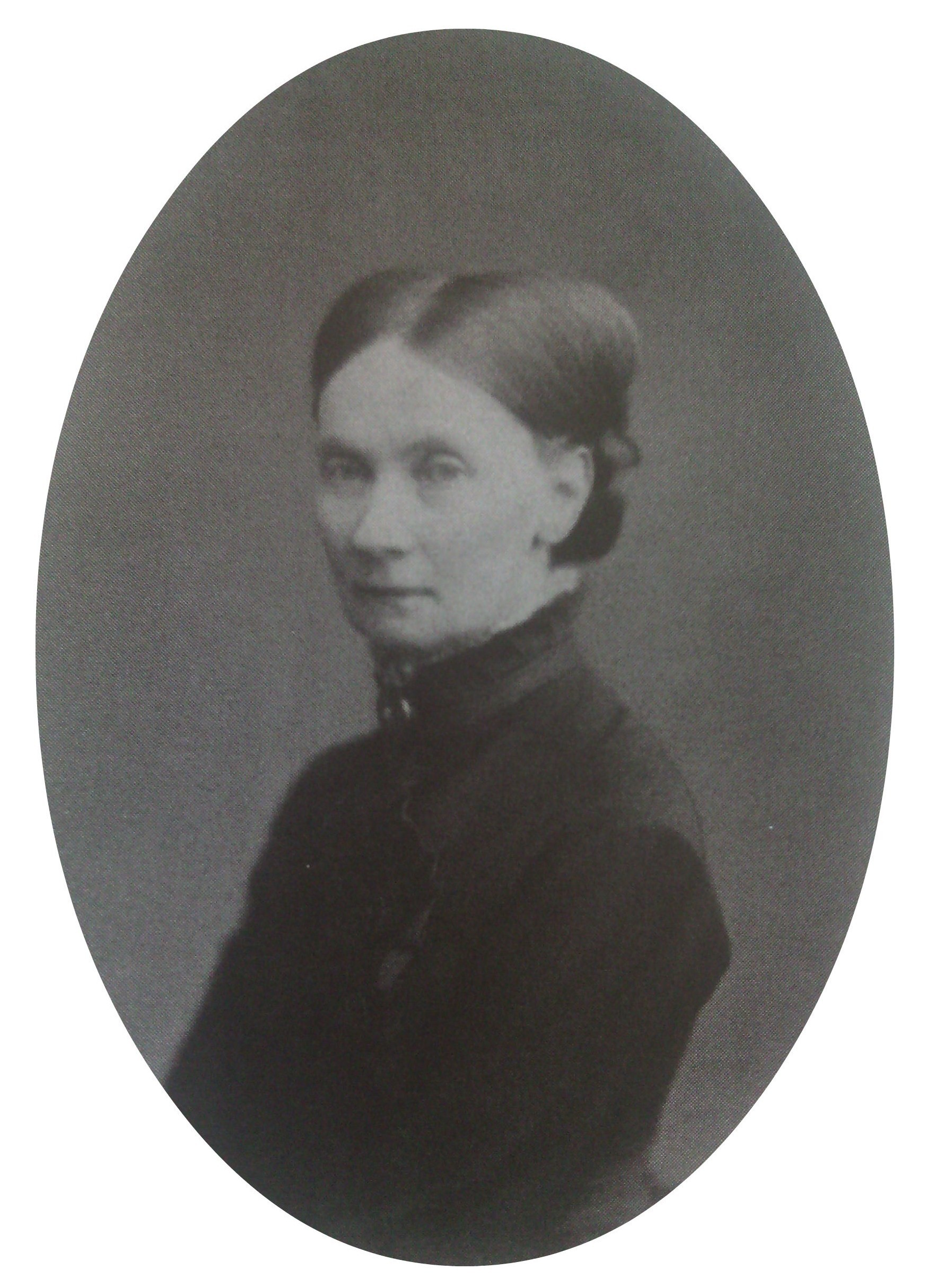 Баронесса Эдита Фёдоровна Раден (1823—1885), гофмейстерина Великой Княгини Елены Павловны, камер-фрейлина императрицы Марии Фёдоровны.